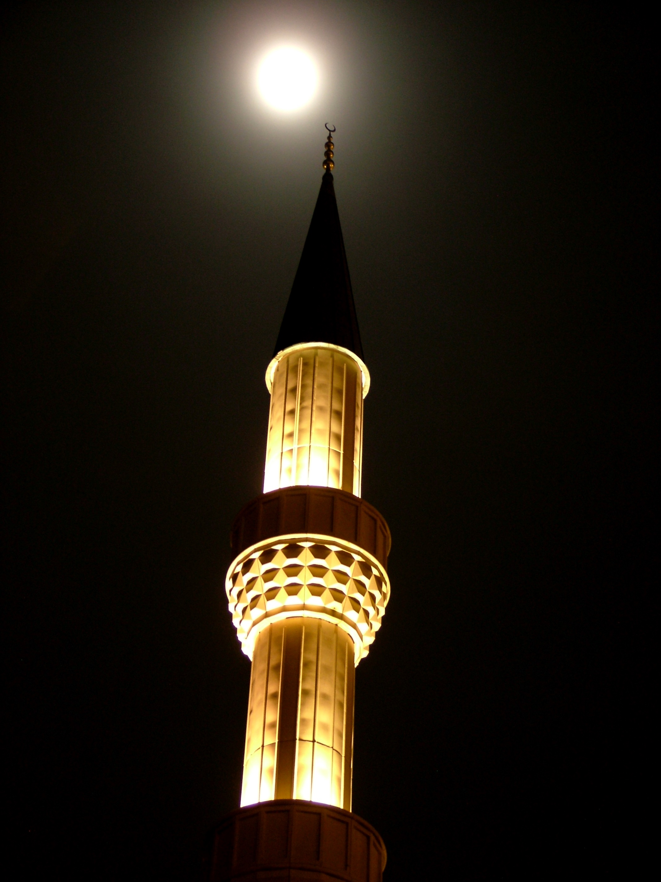 Rotterdam: minaret van de Mevlana-moskee, met maan.